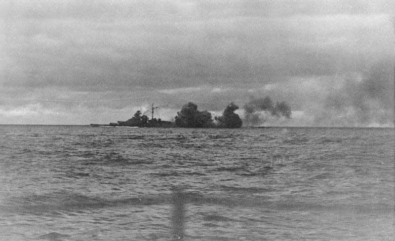 Salve des Schlachtschiffes "Bismarck" beim Gefecht in der Dänemarkstraße. Schlachtschiff Bismarck feuert weiterhin Salve auf Salve. Wilhelmshaven; Herausgabe Datum: Juni 41 PK: MPA-Nord Bildbericht Lagemann Salvo of the battleship Bismarck during the battle in the Denmark Straight. Battleship Bismarck fires continuously salvo after salvo